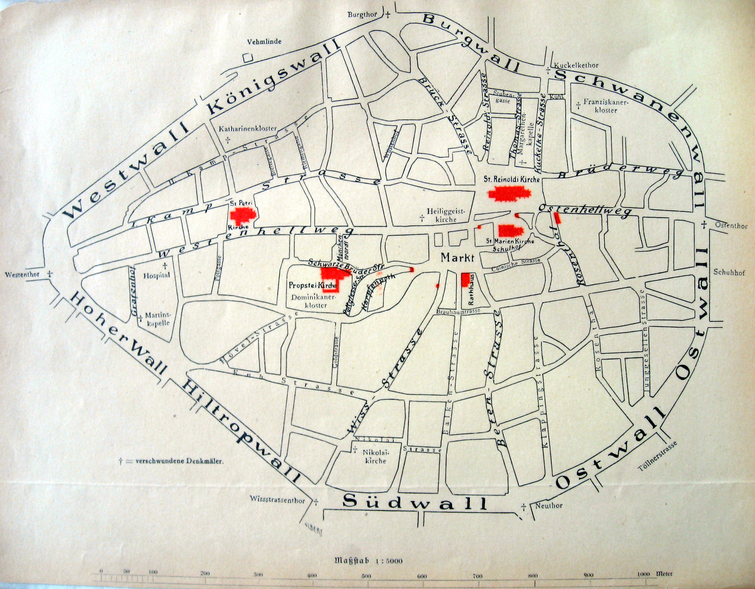 Dortmund, Stadplan der Altstadt 1894